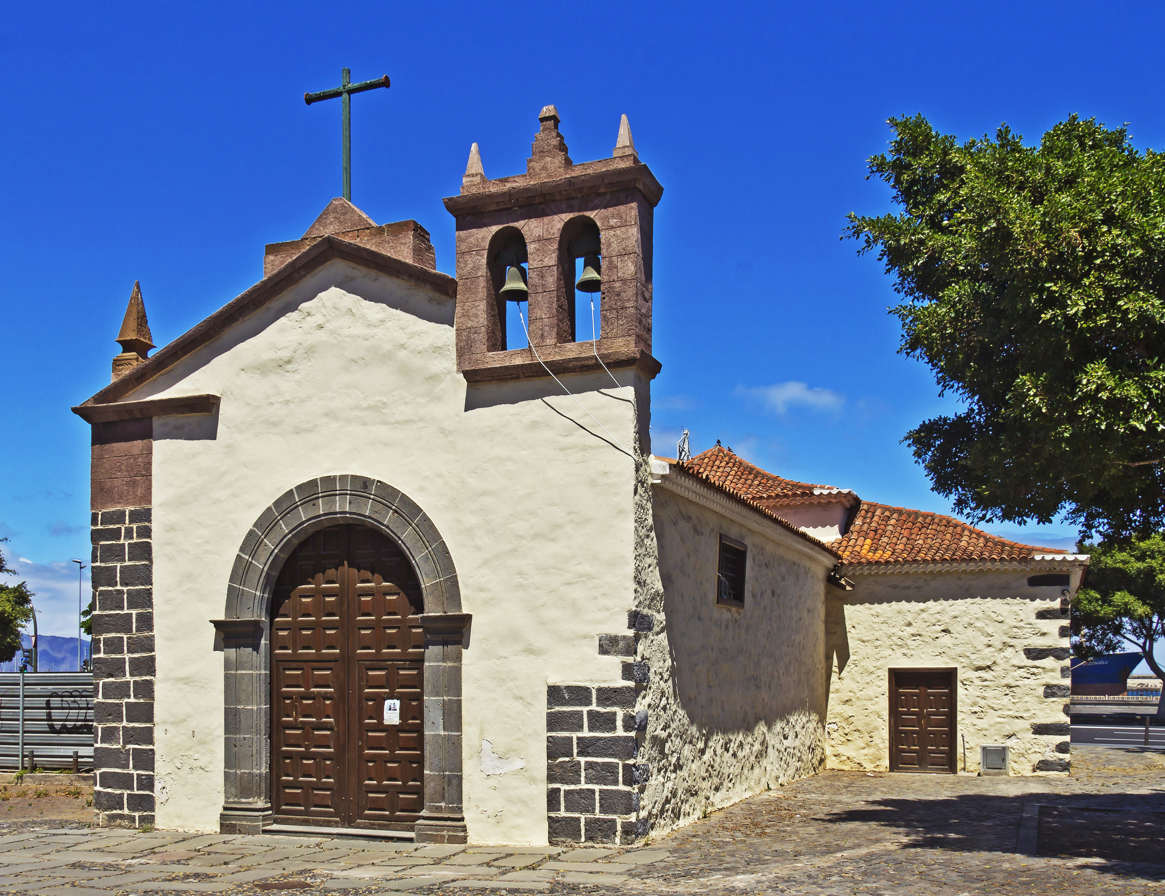 Mit dem Bau der Ermita de San Telmo in Santa Cruz de Tenerife wurde Ende des 16. Jahrhunderts begonnen.